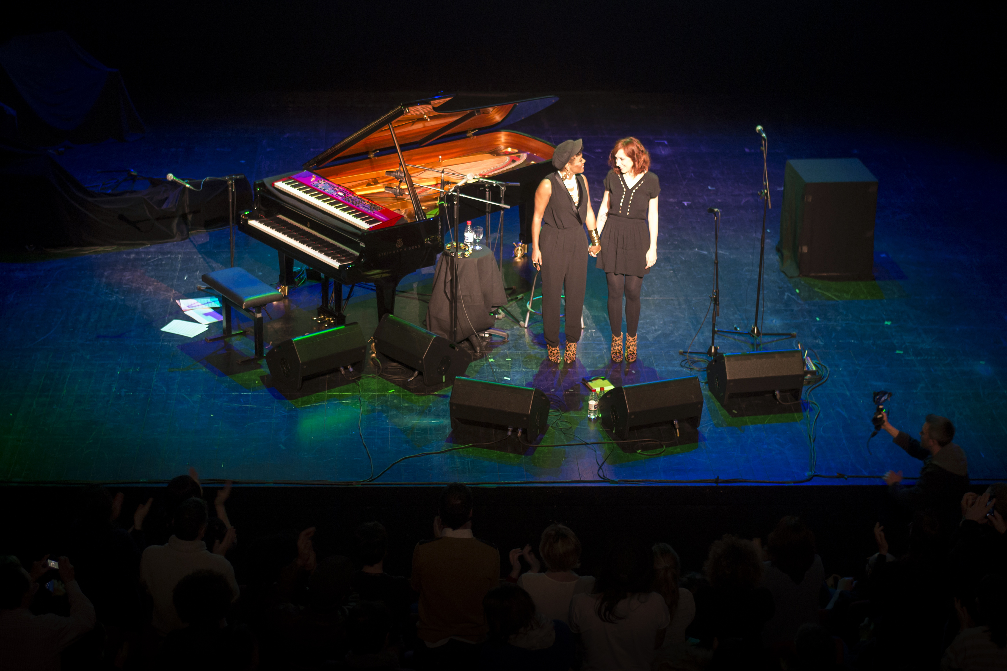 Concert China Moses avec des dessins de Pénélope Bagieu au Festival International de la Bande Dessinée d'Angoulême 2017.